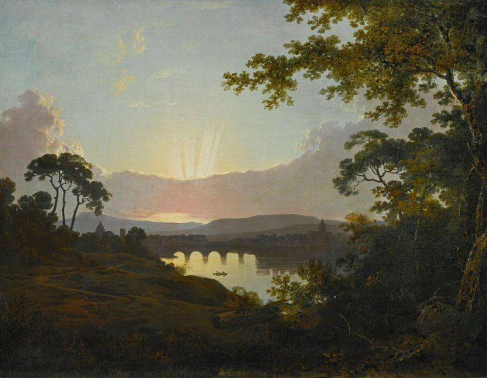 Vue de Florence depuis l’Arno (1793)